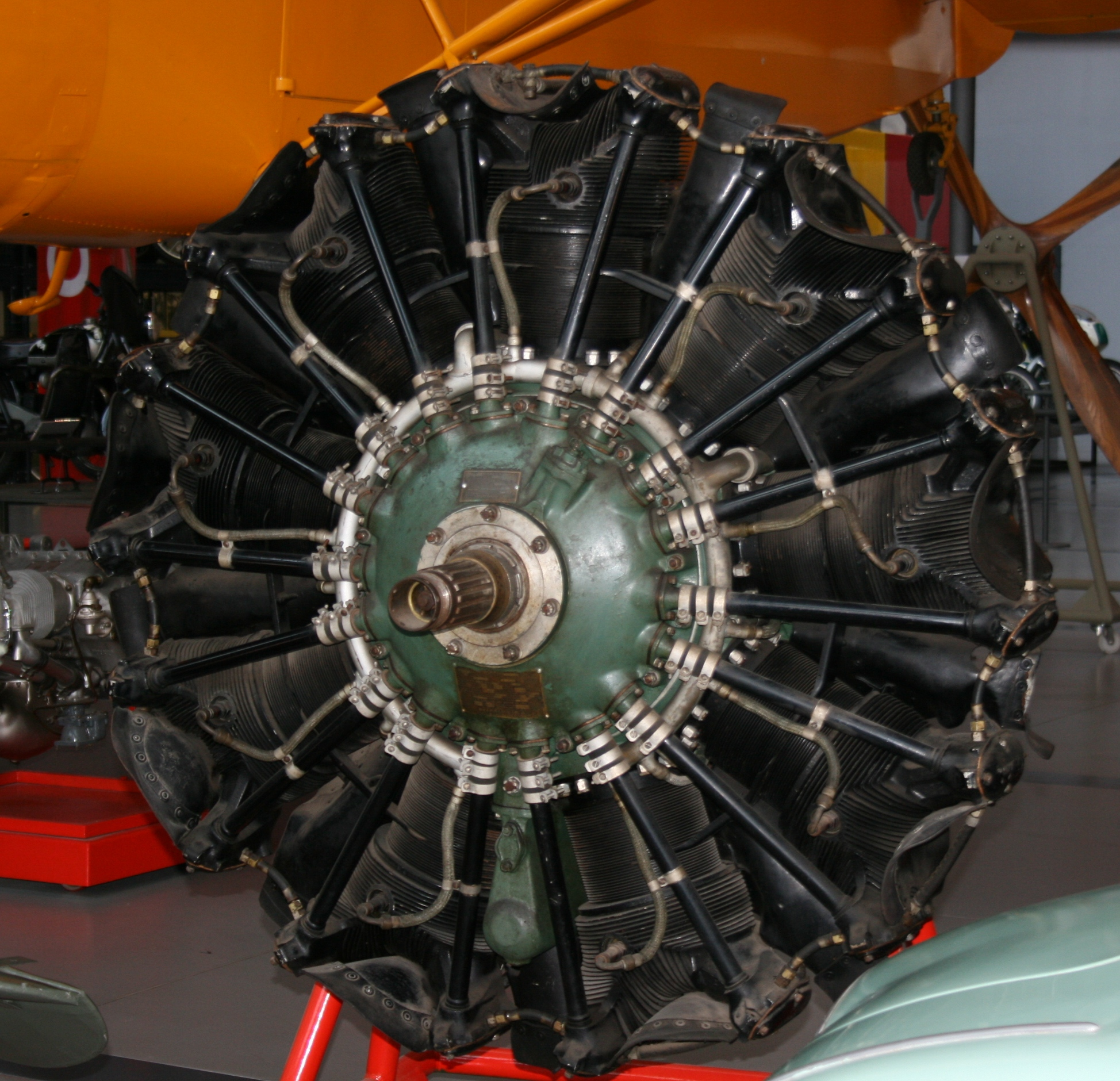 Motor en estrella Elizalde Beta, exposat en el Museu de la Ciencia i la Tècnologia de Terrassa